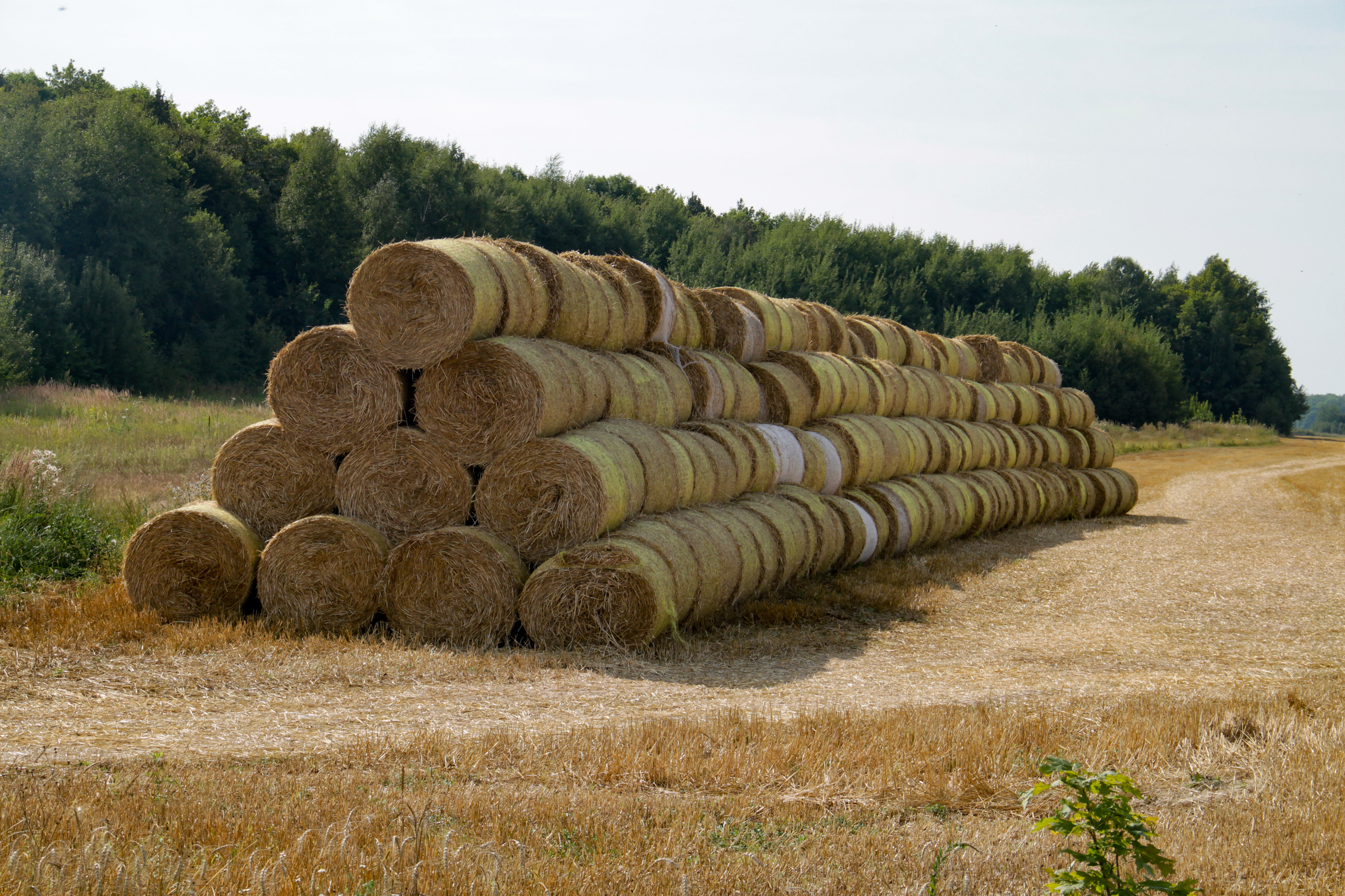 Солома в рулонах. с. Ильинское, Рыбвновский район, Россия